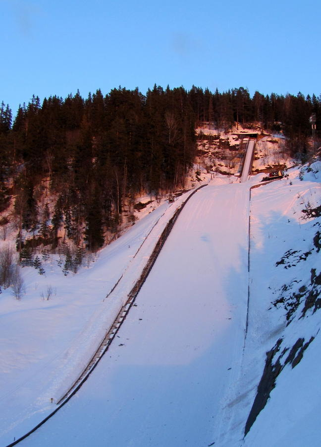 Storbakken (K105) i Vikersund Hoppsenter, Modum kommune, Buskerud fylke, Norge